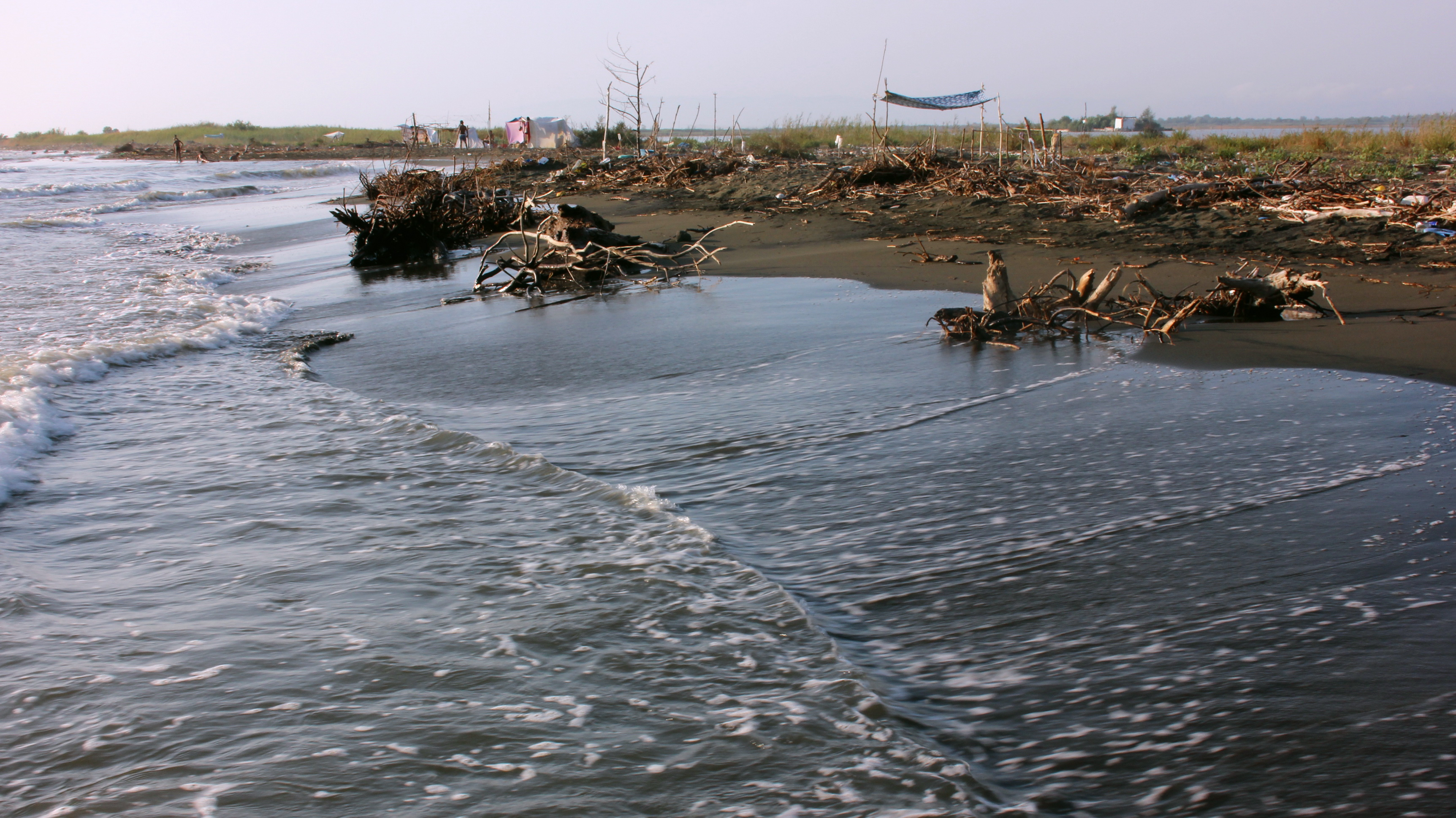 angespültes Holz am Sandstrand von Patog